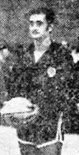 Dragoslav Ražnatović (born 19 April 1941 in Vranje) is a Serbian former basketball player